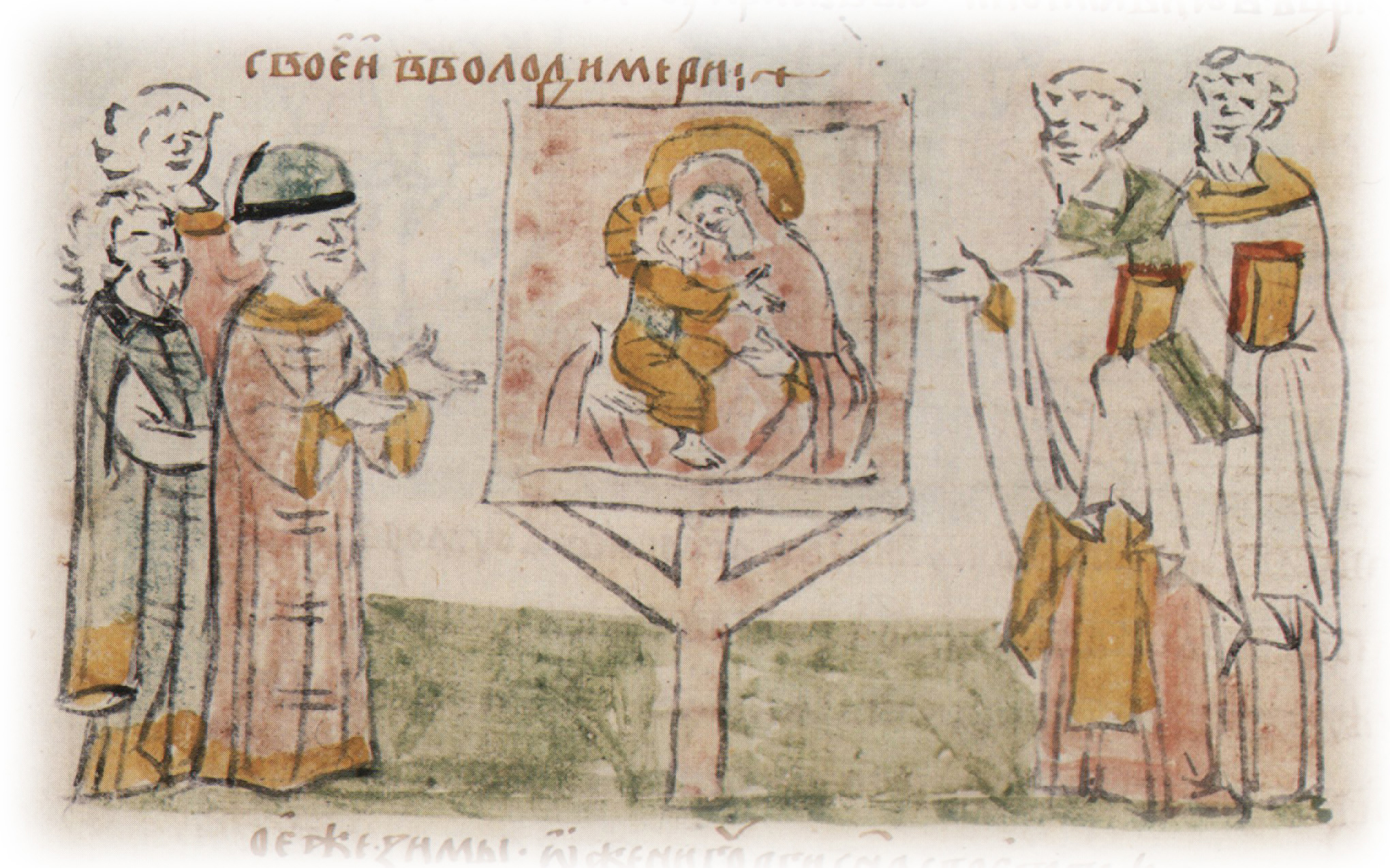 Поставление Андреем Юрьевичем Боголюбским (Владимирским) иконы Богоматери, вывезенной из Киева, во Владимирской Богородцкой церкви. Техника: перо, чернила Время создания: конец XV века Местонахождение: Оригинал летописи находится в Библиотеке Академии Наук в Санкт-Петербурге Источник: Радзивиловская летопись Изображенное время: 1155 г. Изображенное событие: "И принесе идя икону Святое Богородици, юже принесоша в едином корабли с Пироговищею изо Царяграда, ...и постави ю в церкви своей в Володимери". Литература, в которой описана миниатюра: Кондаков Н. П. О миниатюрах Кенигсберского списка начальной летописи // Радзивиловская, или Кенигсбергская, летопись. СПб., 1902. Т. 2. Статьи о тексте и миниатюрах летописи. С. 122.